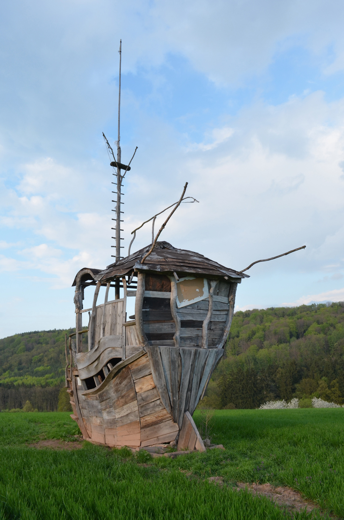 Dílo výtvarníka Františka Skály